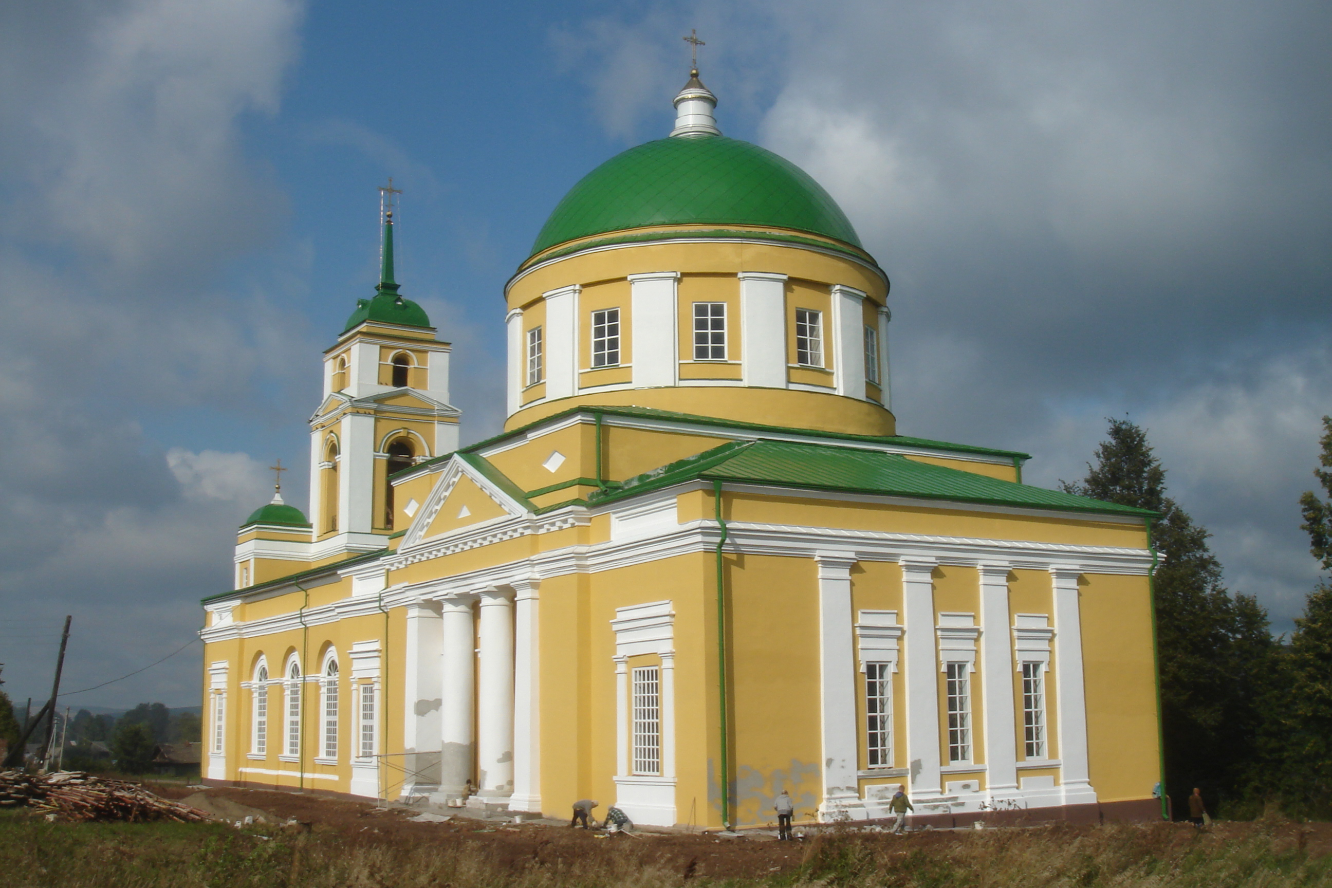 Преображенская церковь. Село Мазунино.